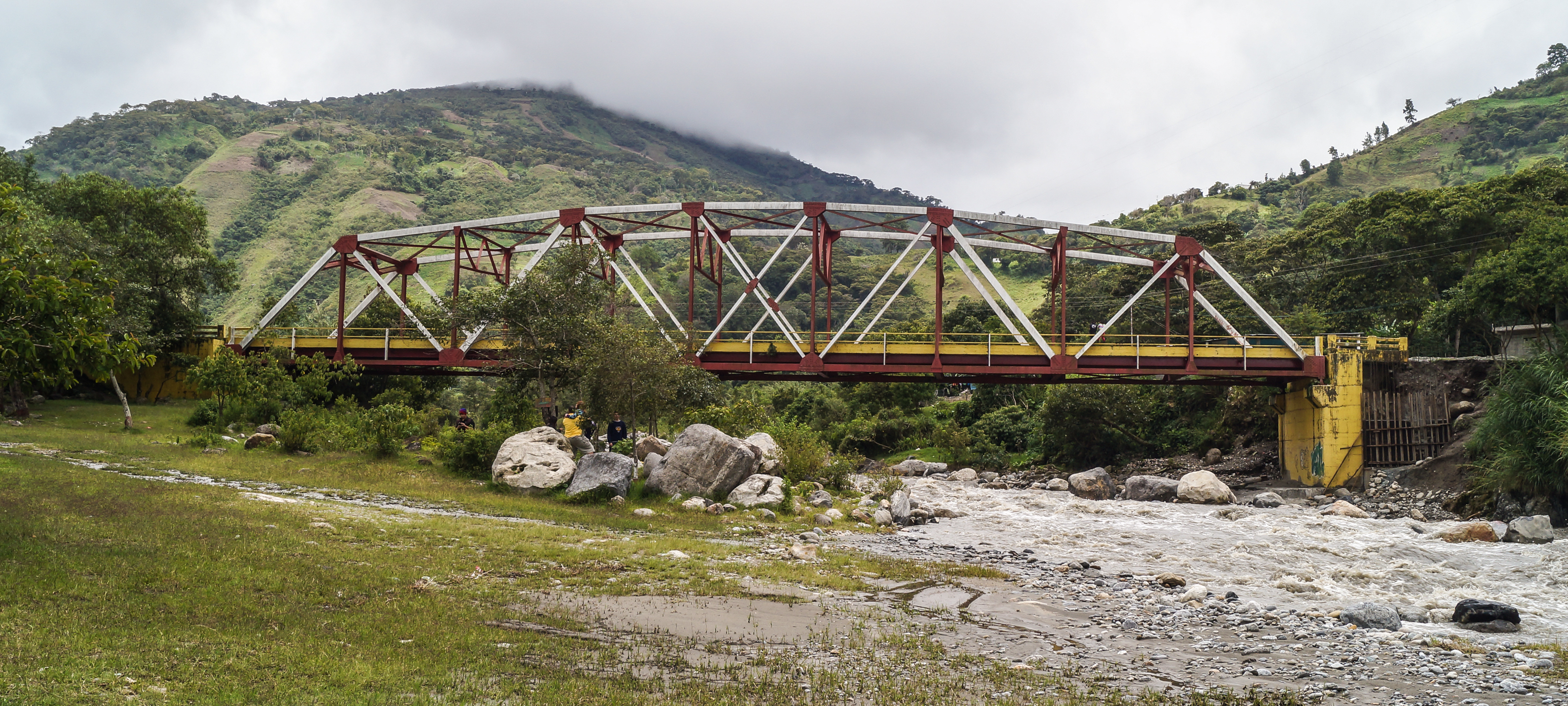 El puente se encuentra entre las poblaciones de Boconó y Niquitao. El río que pasa por debajo es el Burate, el cual es un afluente del río Boconó.